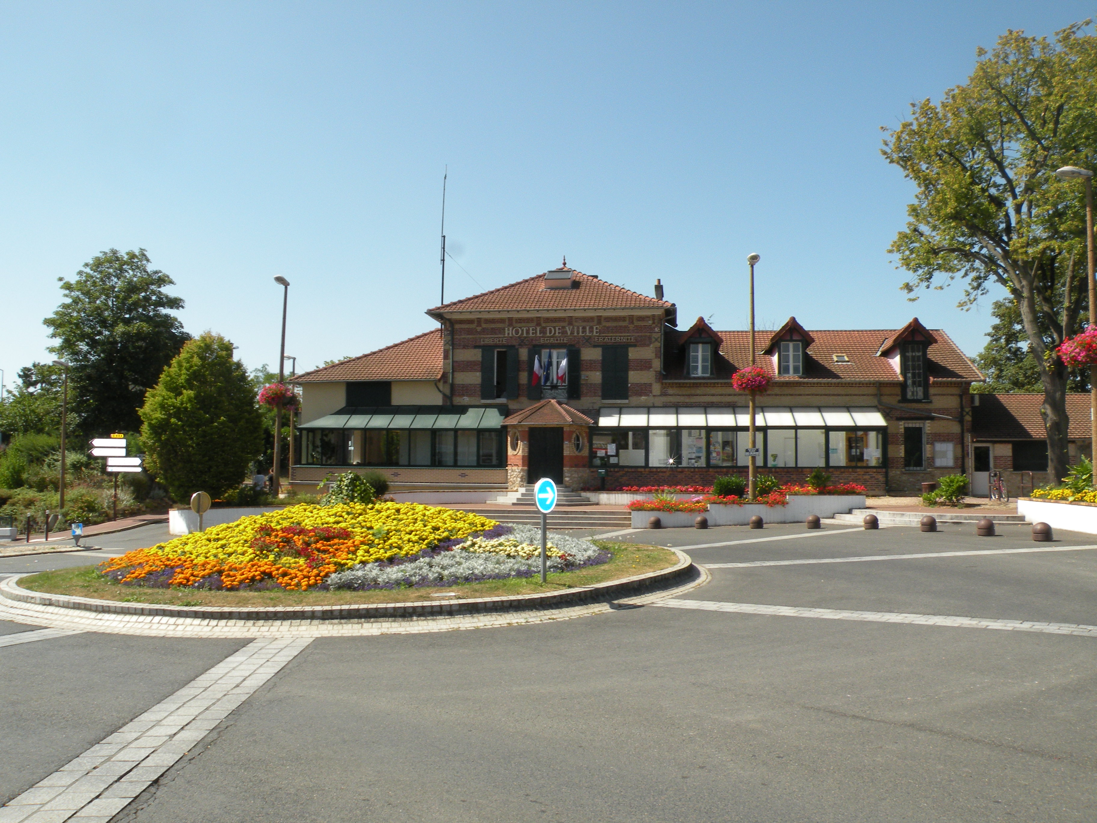 Hôtel de ville d'Éragny-sur-Oise